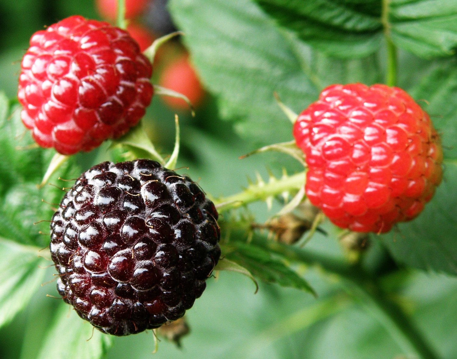 Owoce jeżyny (Rubus occidentalis)